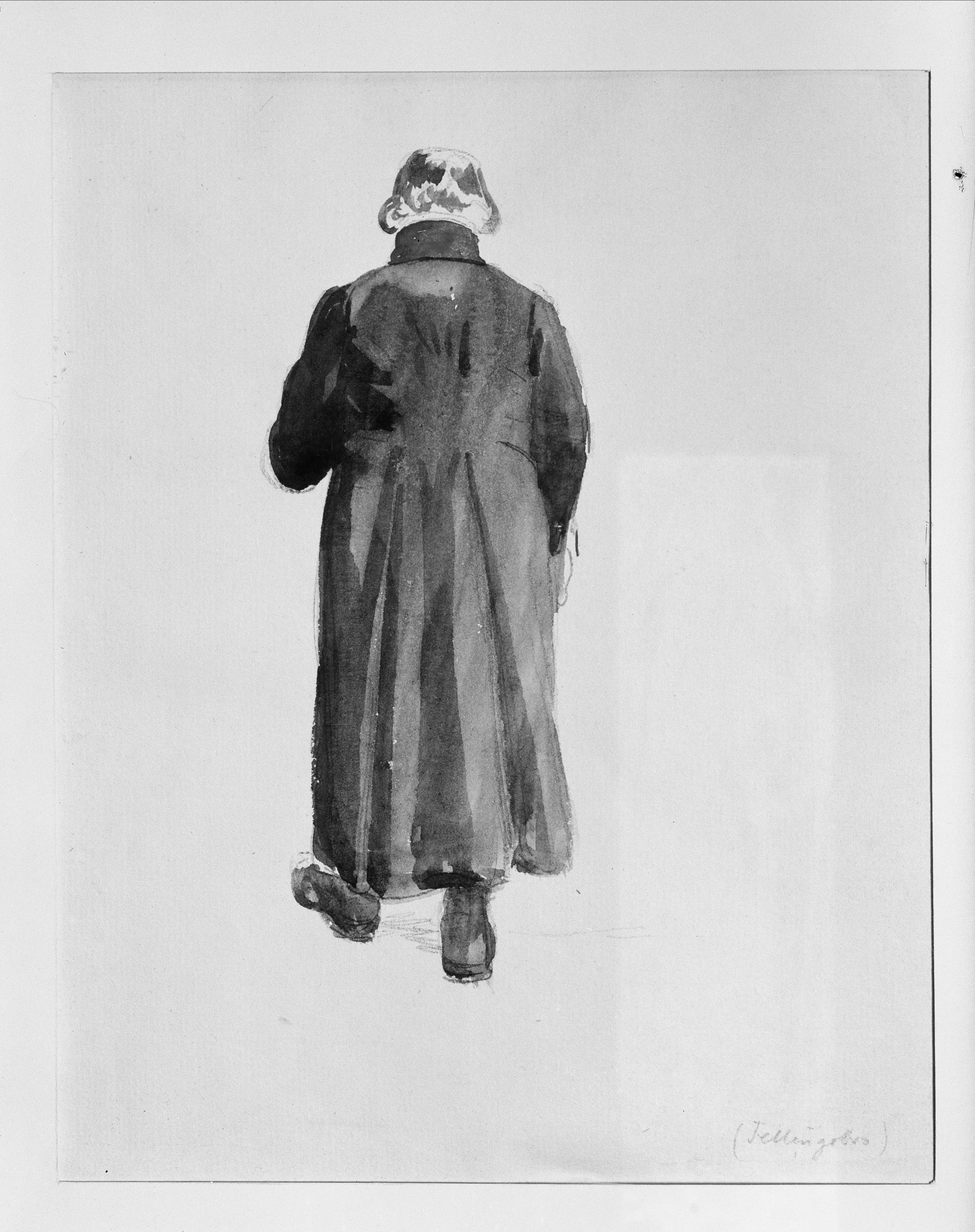 Akvarell Mansdräkt från Fellingsbro. (bakifrån). Västmanland. Fellingsbro sn. Akvarell av J. W. Wallander